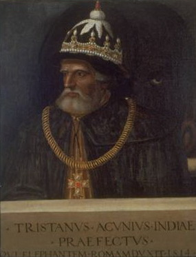 Ritratto di Tristano da Acugna ambito raffaellesco Misure: 750 mm x 960 mm Notizie storico-critiche: Il ritratto venne probabilmente tolto dal Museo di Borgovico per essere portato nella casa Grande dei Giovio, oggi corrispondente ai numeri 107 e 109 di via V.Emanuele.cfr. Rovelli, 1928, p.157. Qui rimase agli eredi con cognome Giovio fino circa alla metà del xix secolo, quando l'ultimo discendente, Paolo Giovio, vendette gli immobili a Pietro Baragiola e divise fra le nipoti e le figlie la collezione dei ritratti. Il dipinto venne spedito a Como nel maggio 1549. Unica derivazione è l'incisione dello Stimmer (P.Giovio, 1575, p.230). L'esploratore portoghese fece il suo ingrsso trionfale in Roma il 12 marzo 1514, portando a Leone X le spoglie della sua recente conquista dell'India: è a questo che si riferisce l'iscrizione nel quadro. Se questo quadro fosse stato realizzato per Giovio mentre Tristano era a Roma, sarebbe il più antico dipinto della collezione Giovio. E' possibile che il dipinto sia stato copiato da un altro di bottega raffaellesca fatto quando Tristano era a Roma, tra il 1514 e il 1520; esso sembra anche essere l'unico ritratto conosciuto di Tristano del xvi secolo. cfr. scheda Klinger nell'Archivio Musei Civici di Como.